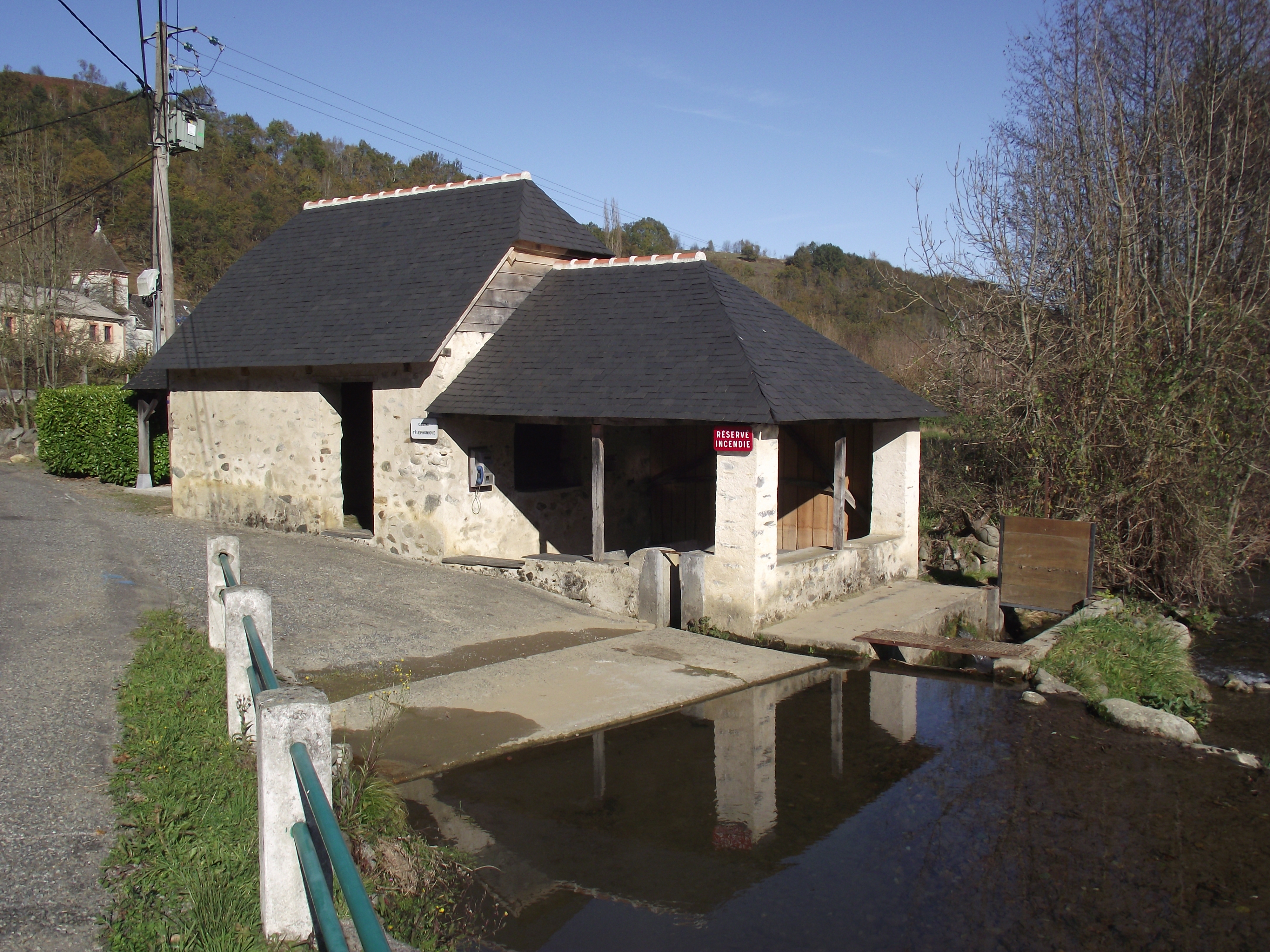 Lavoir d'Escoubès (Escoubès-Pouts, Hautes-Pyrénées, France)